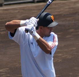 Giangs_Edgar_42